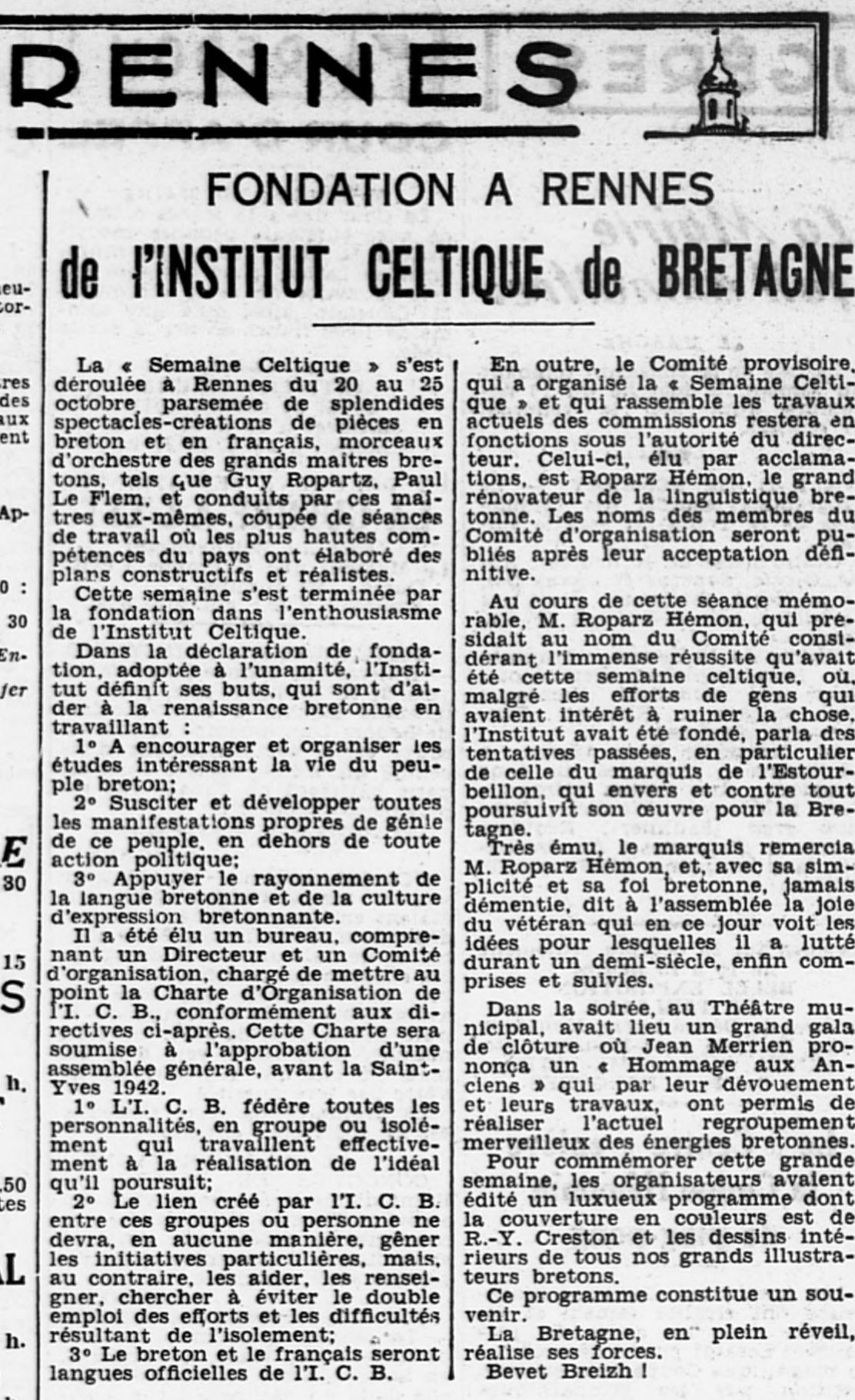 Article du Ouest-Eclair faisant part de la "fondation à Rennes de l'institut celtique de Bretagne"